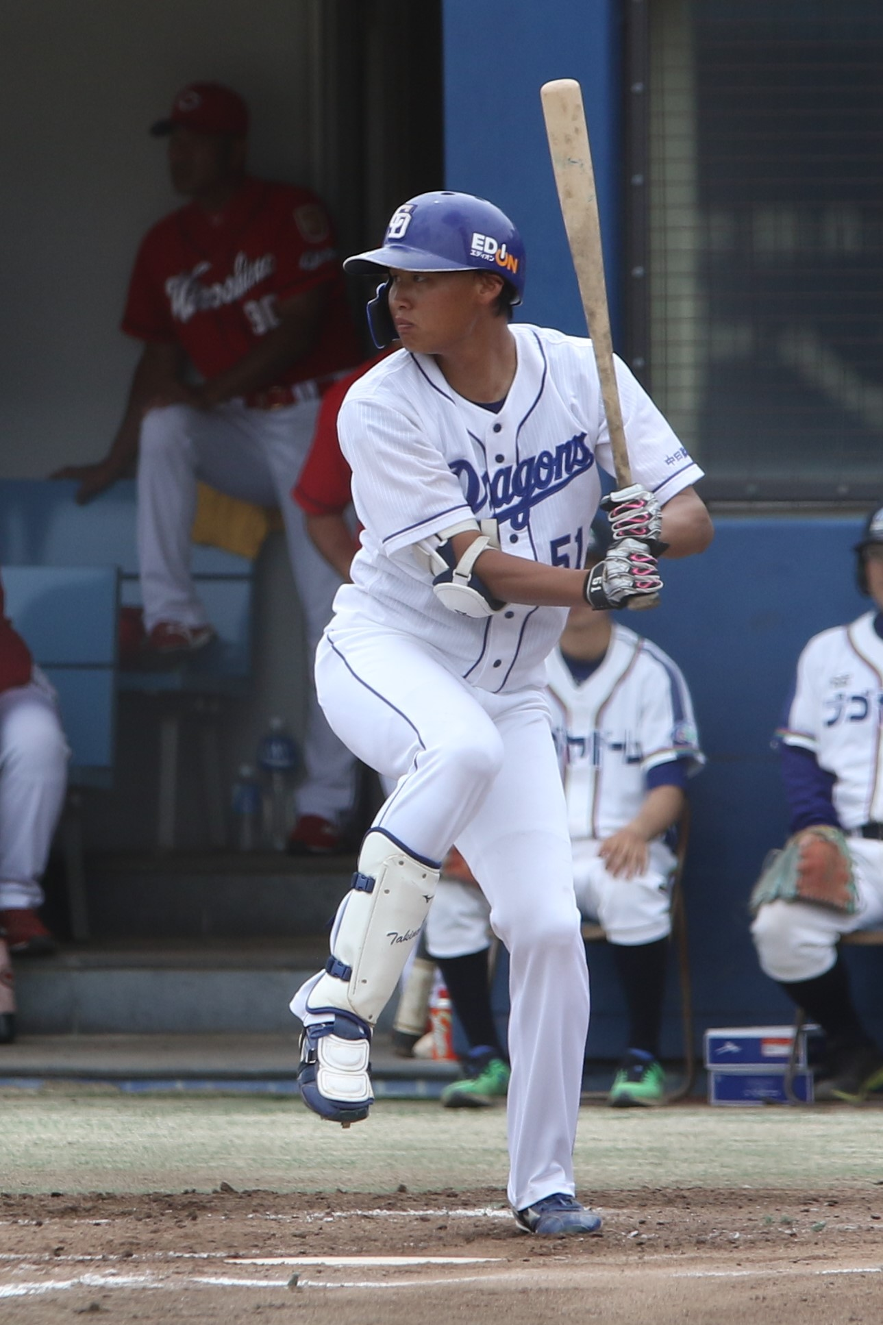 2019年6月23日、ナゴヤ球場にて